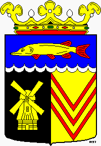 Ardamez Schermer.